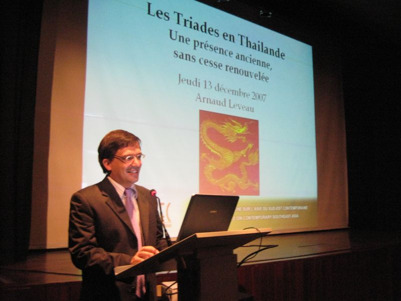 Conference in Bangkok